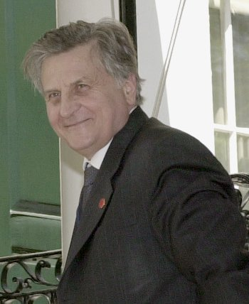 Jean-Claude Trichet at the G7 meeting on 2001/04/28. Jean-Claude Trichet beim Treffen der G7-Finanzminister am 28. April 2001 (Bildausschnitt).